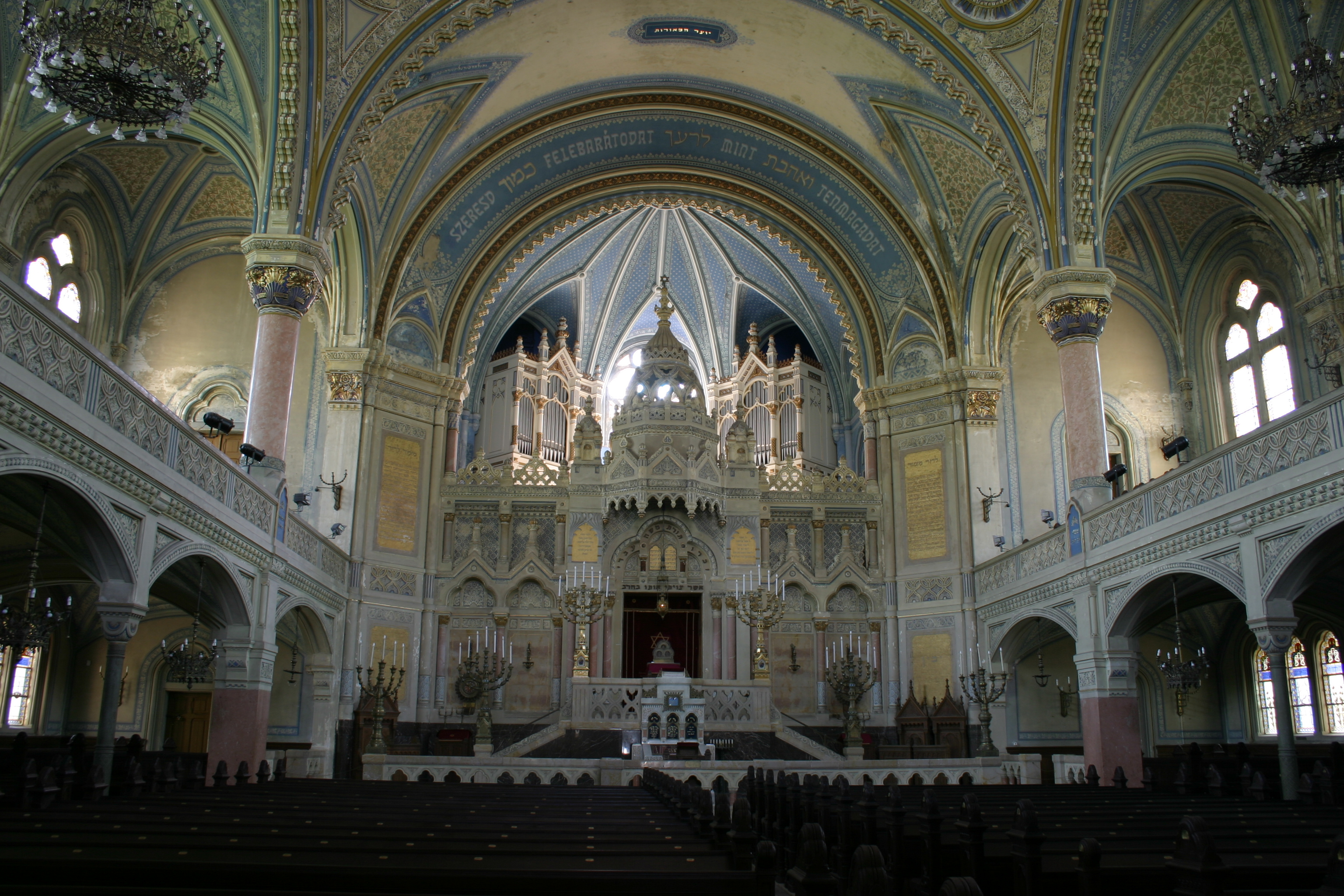 Szeged Új zsinagóga Az oltár előtt A diadalíven a felirat magyarul és héberül. Somorjai Ferenc felvétele